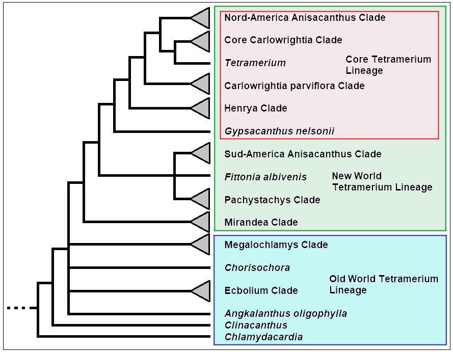 Cladogramma_del_gruppo Tetramerium_Lineage (Acanthaceae)